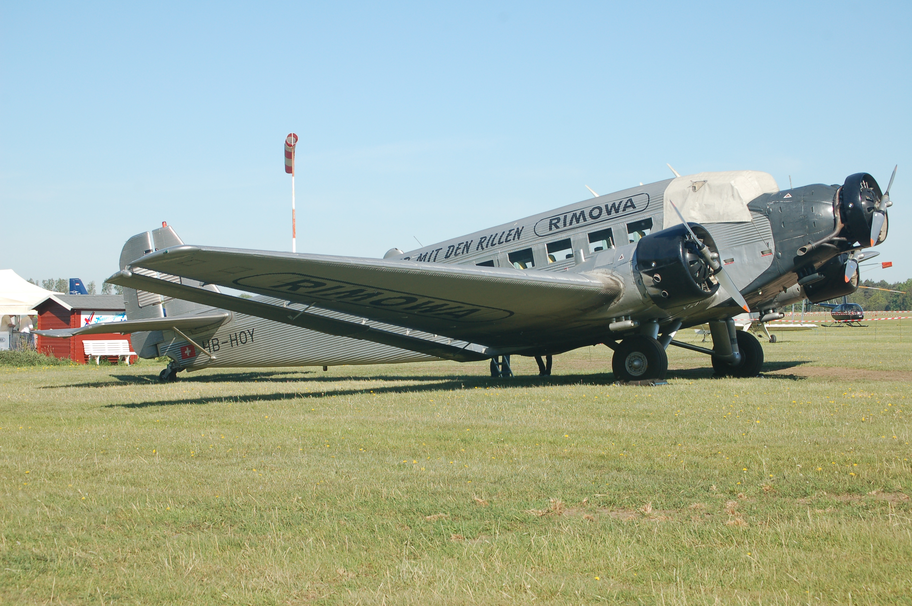 Junkers Ju 52(HB-HOY) auf dem Flugplatz Uetersen